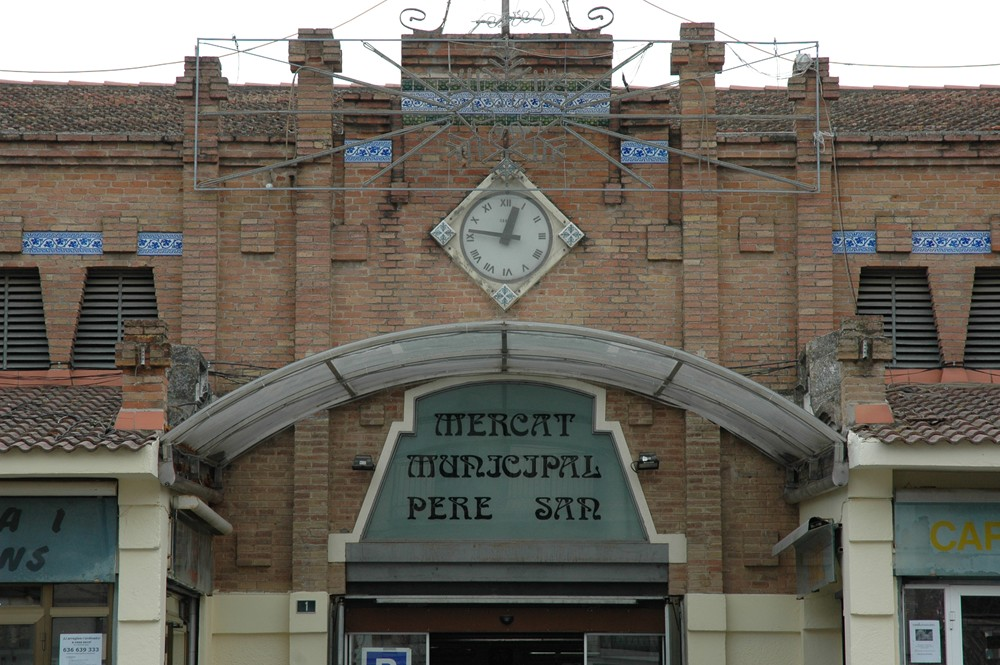 Mercat Pere San entrada (by Ferran Cels)